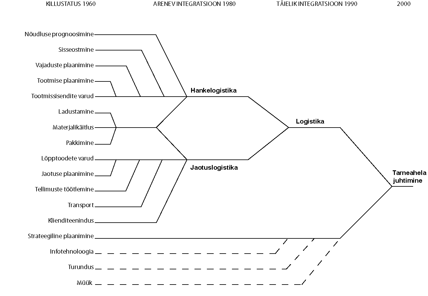 Logistika evolutsiooni etapid.